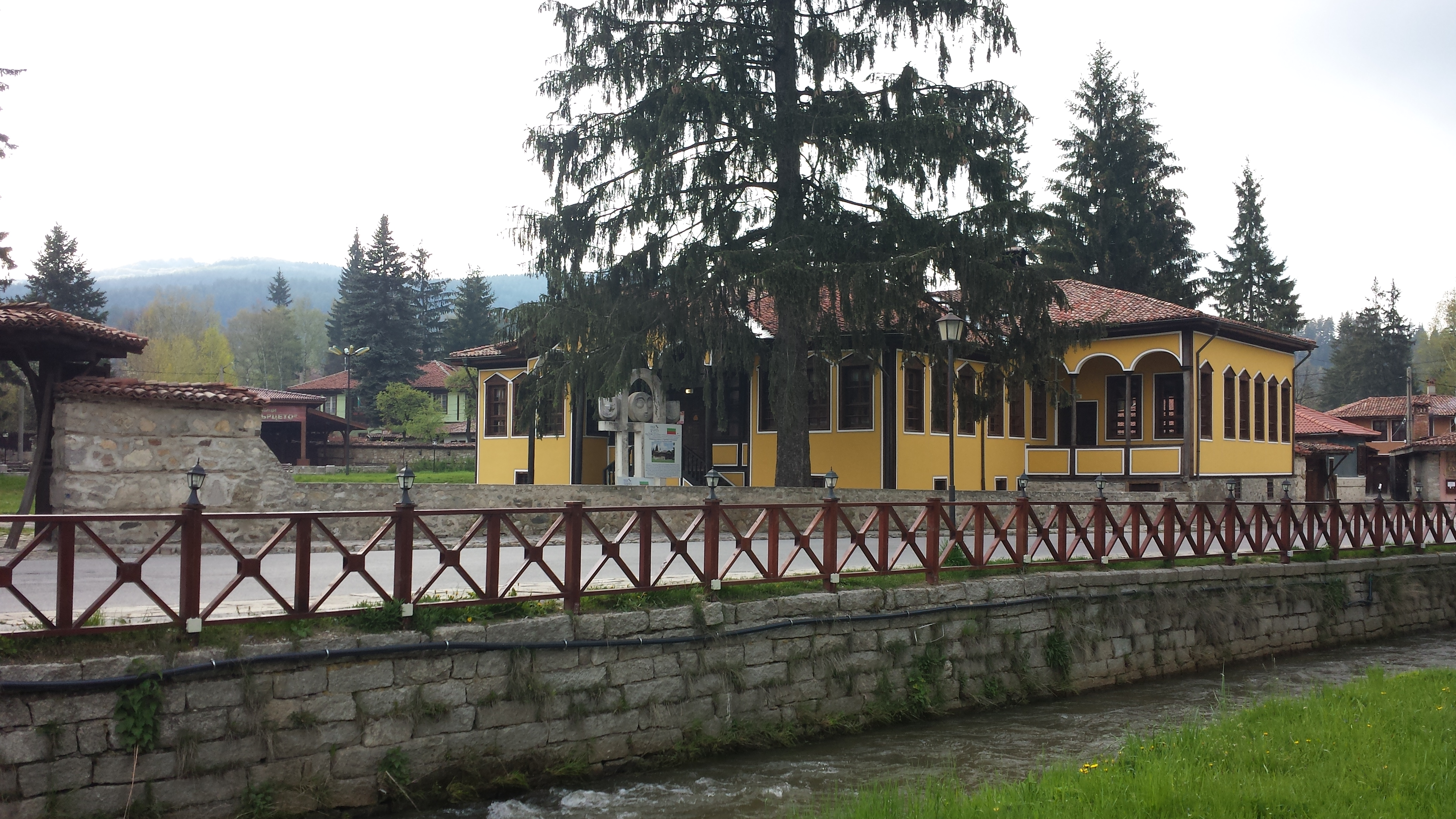 Жив Музей